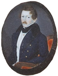 Philipp von Zu Rhein (1809-1870), Regierungspräsident von Oberbayern